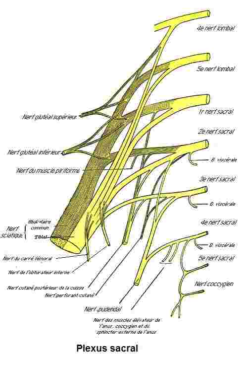 Plexus sacral